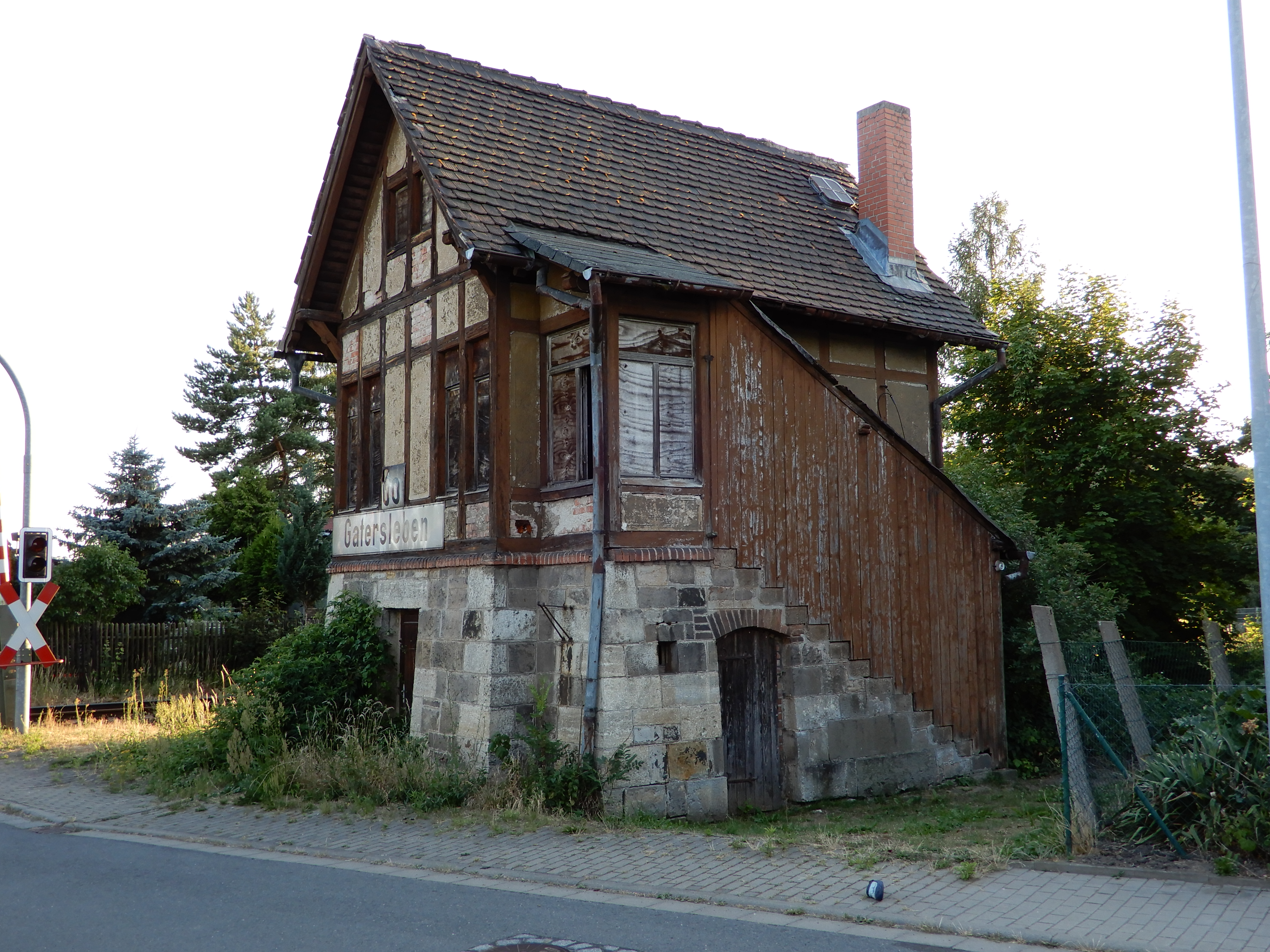 Gatersleben, Stellwerk Unterdamm